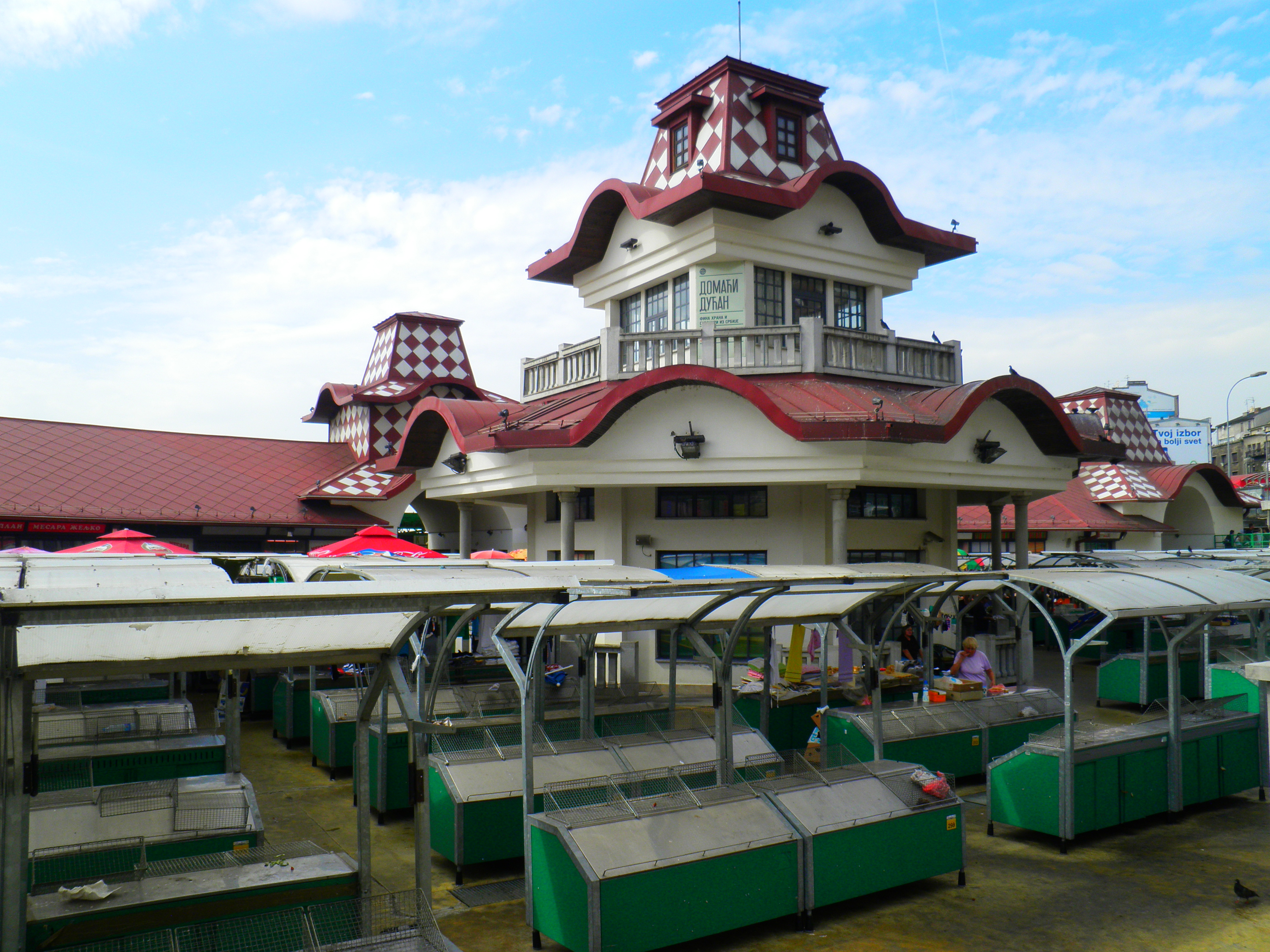 Pijaca Zeleni venac